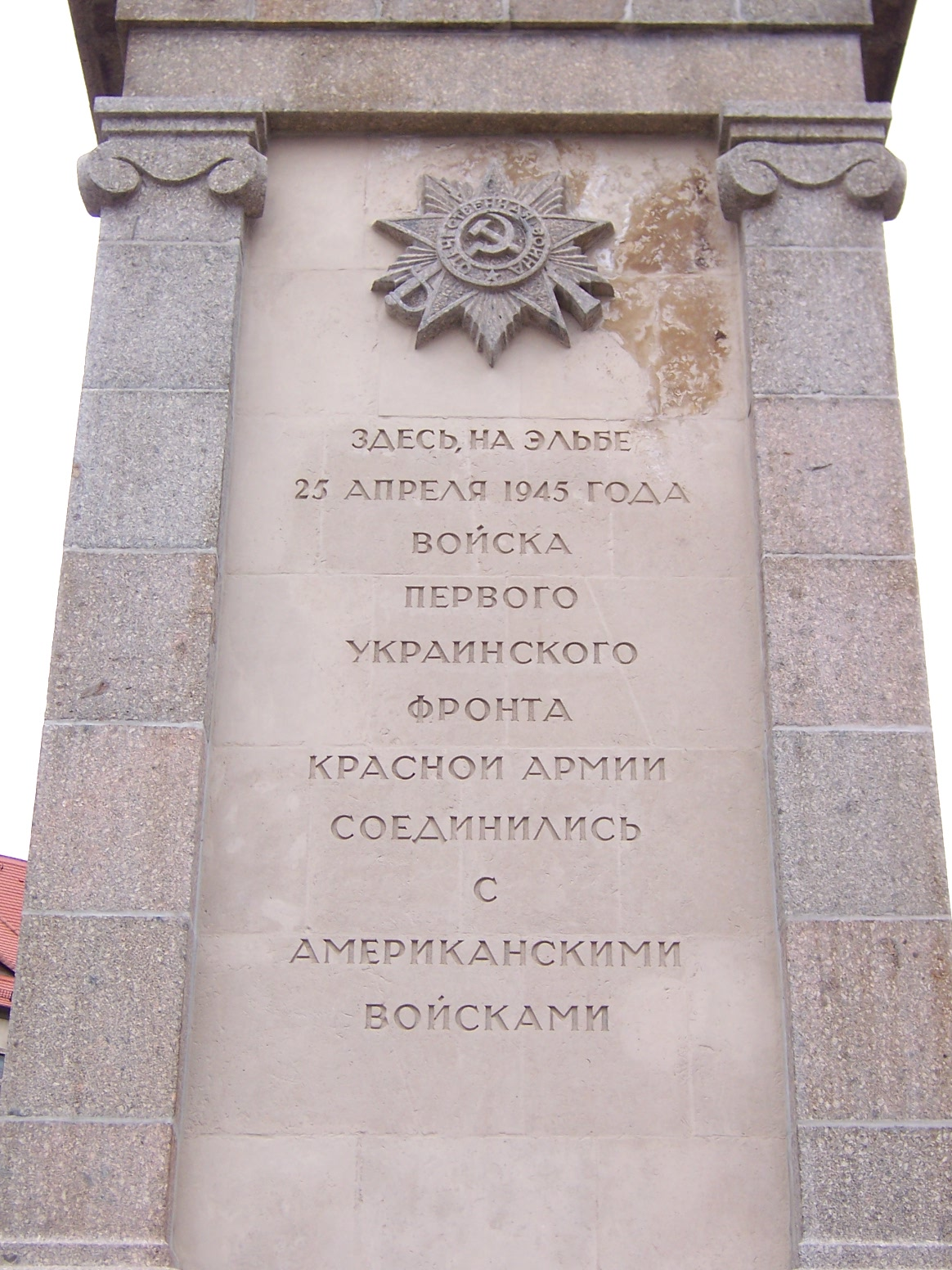 Denkmal der Begegnung zwischen amerikanischen und sowjetischen Truppen in Torgau an der Elbe (Sachsen) - russische Inschrift / Soviet monument commemorating the meeting of US and Soviet troops in Torgau, Saxony (Germany) - Russian inscription eigene Aufnahme vom 16. April 2006 / own work, photo taken on 16 April 2006